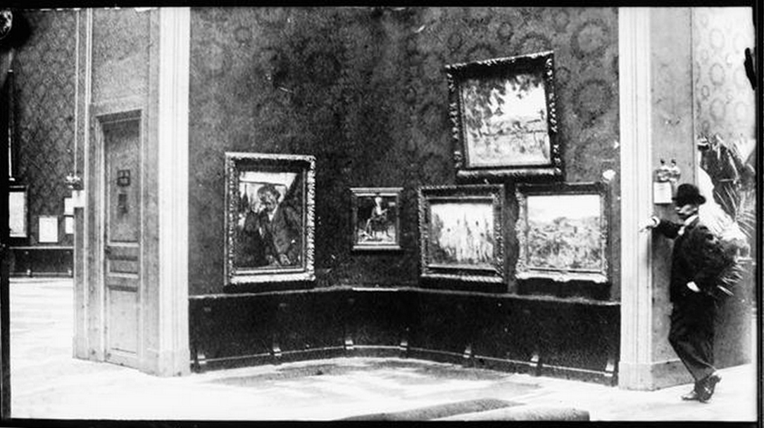 Vue de l'Exposition du Salon d'Automne de 1904, photograph by Ambroise Vollard, Salle Cézanne (le fumeur accoudé, Victor Choquet, Baigneuses), Paris, Musée d'Orsay